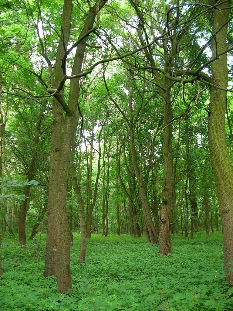 Rezerwat przyrody Wielka Kępa Ostromecka k Bydgoszczy